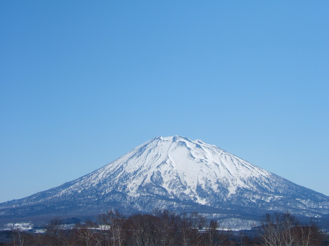 Mt. Yotei (Hokkaido, Japan)